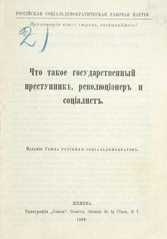 Что такое Государственный преступник, революционер и социалист (Cos'è un criminale di Stato, un rivoluzionario e un socialista), Genève, Tipografija Sojuza, 1899